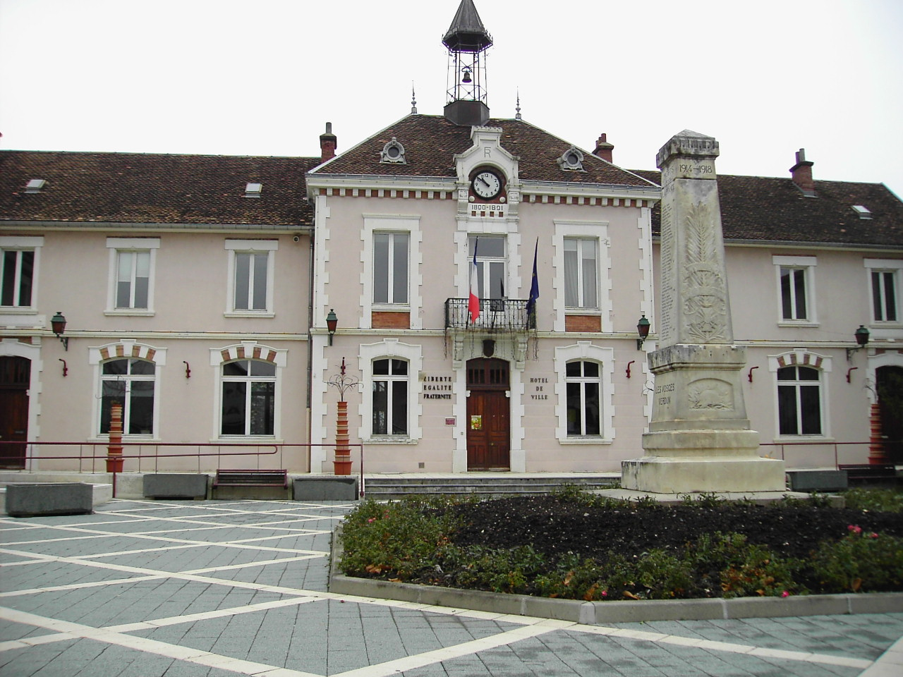 Mairie de Vif